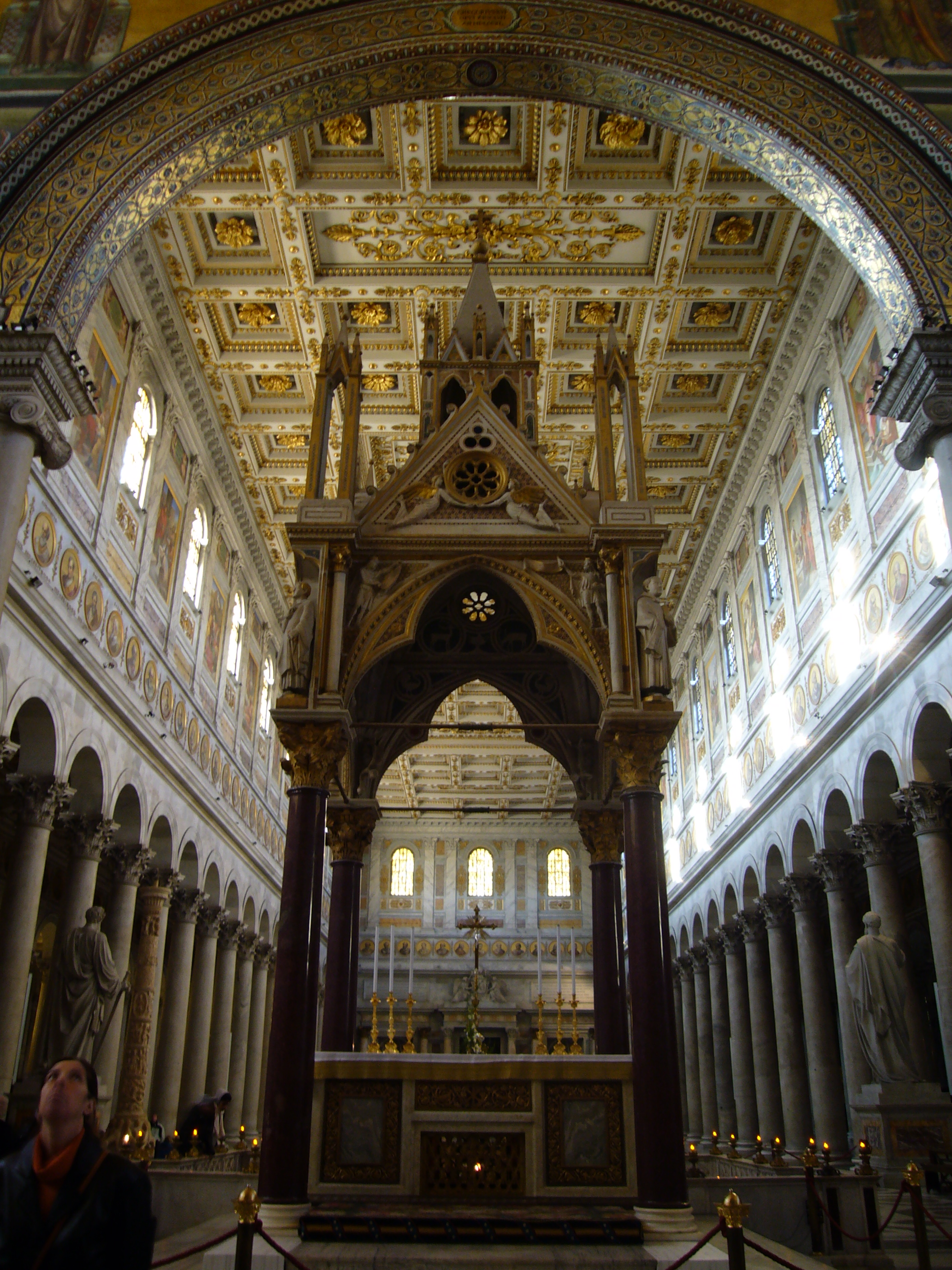 Roma, san Paolo fuori le mura: ciborio di Arnolfo di Cambio